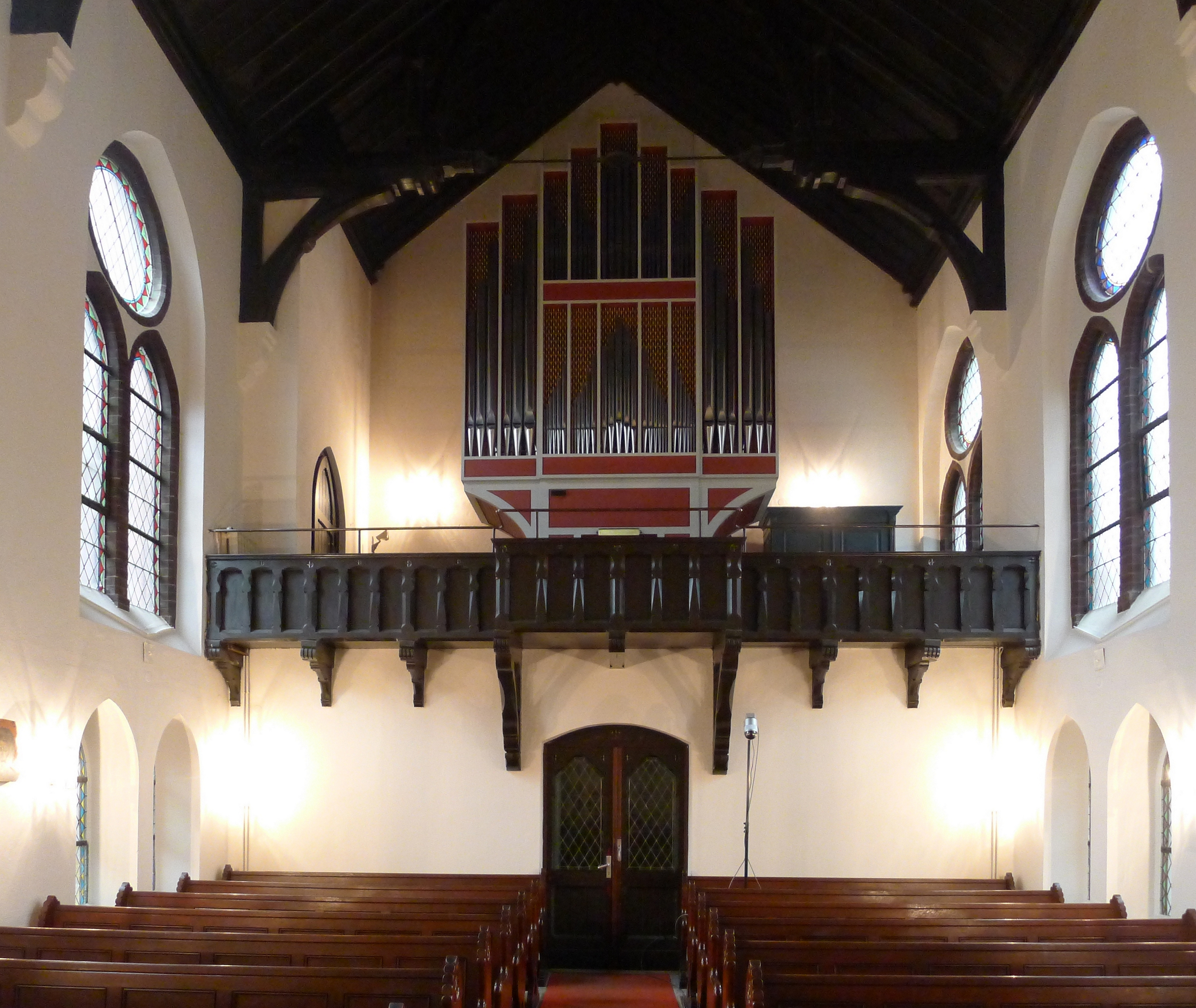 Blick in den Kirchraum Richtung Orgelempore